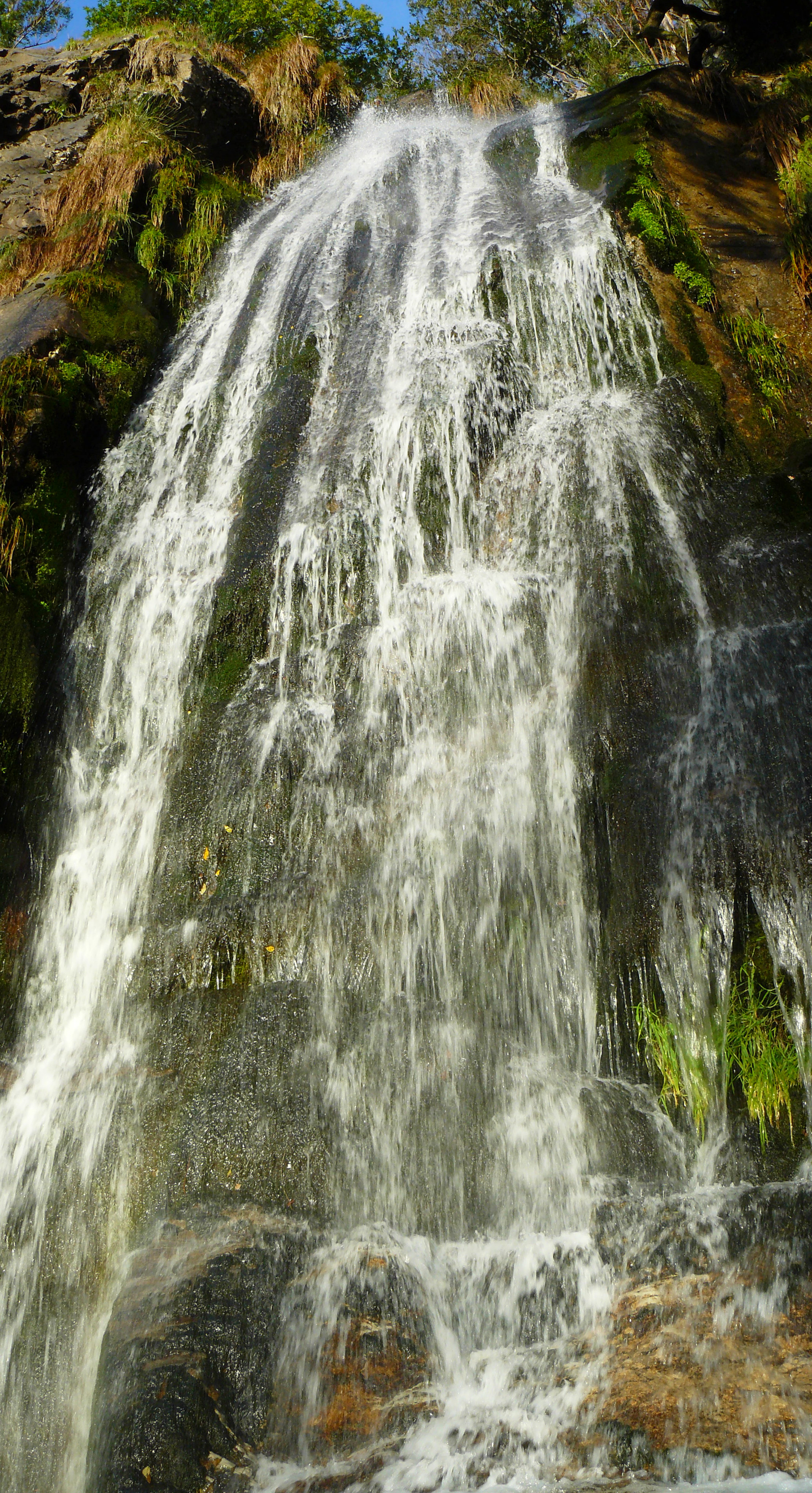 Fervenza do río Sieira, A Madanela, Ribasieira, Porto do Son